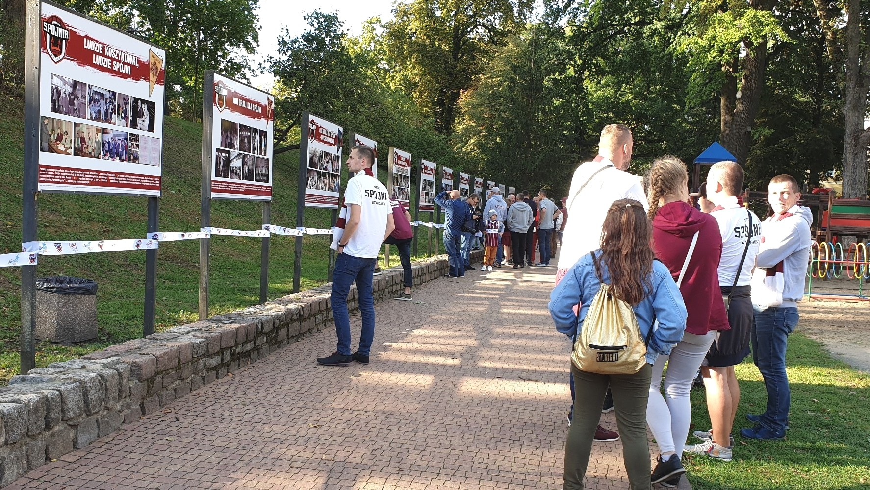 70-lecie Spójni Stargard. Wystawa fotograficzna